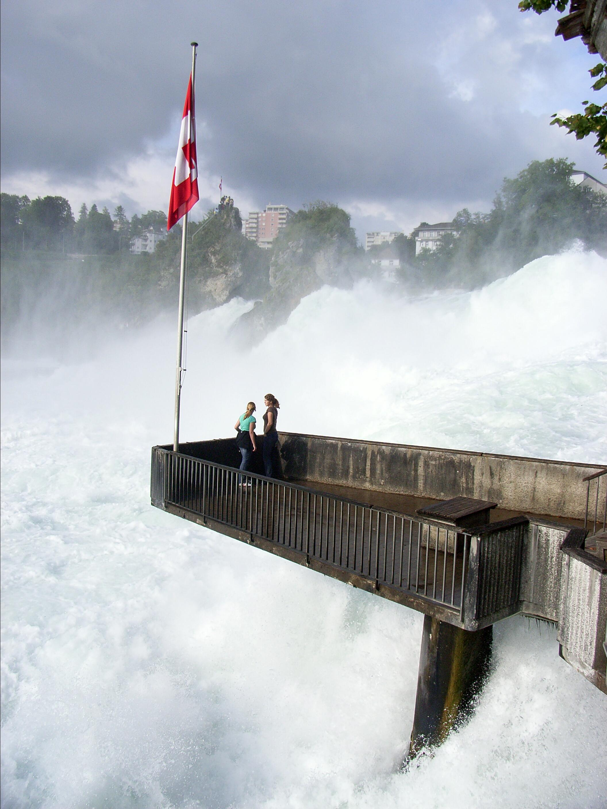 Dieses Bild zeigt einen Steg am Rheinfall.